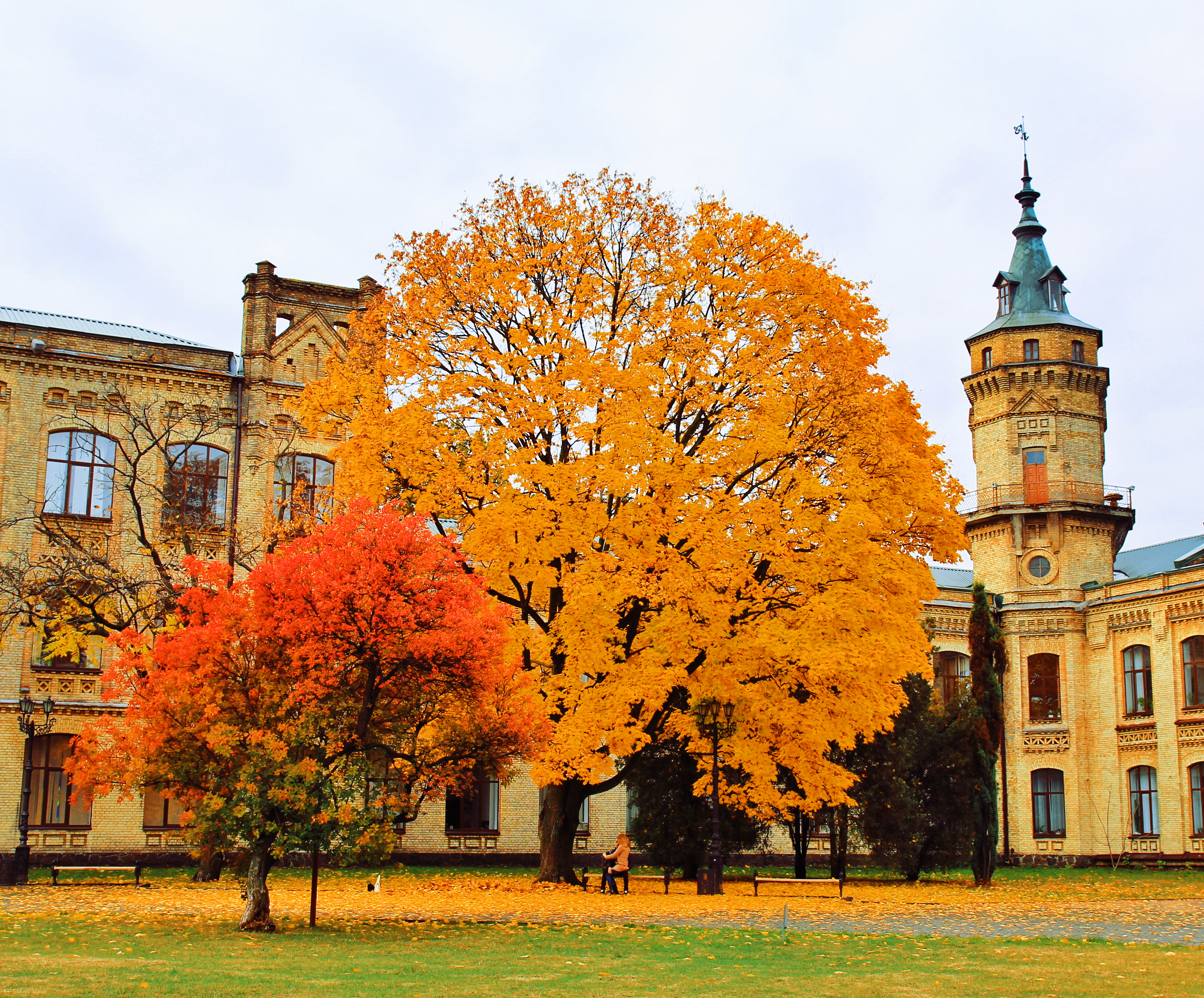 Комплекс споруд Київського політехнічного інституту, Київ, Перемоги просп., 37